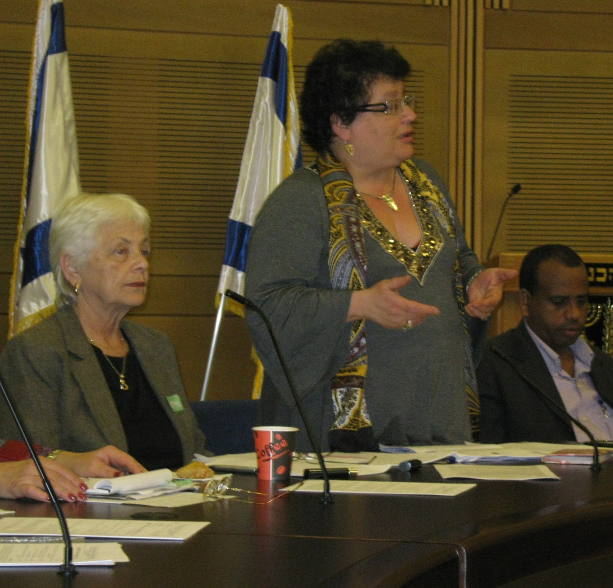 אסתר הרצוג ומרינה סולודקין בשדולה למען זכויות ילדים והורים בכנסת 2010